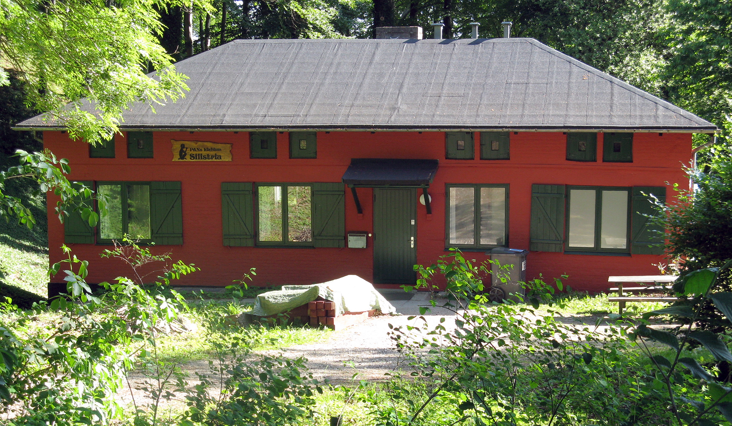 Vandmøllen Silistria i Marselisborgskoven ved Aarhus